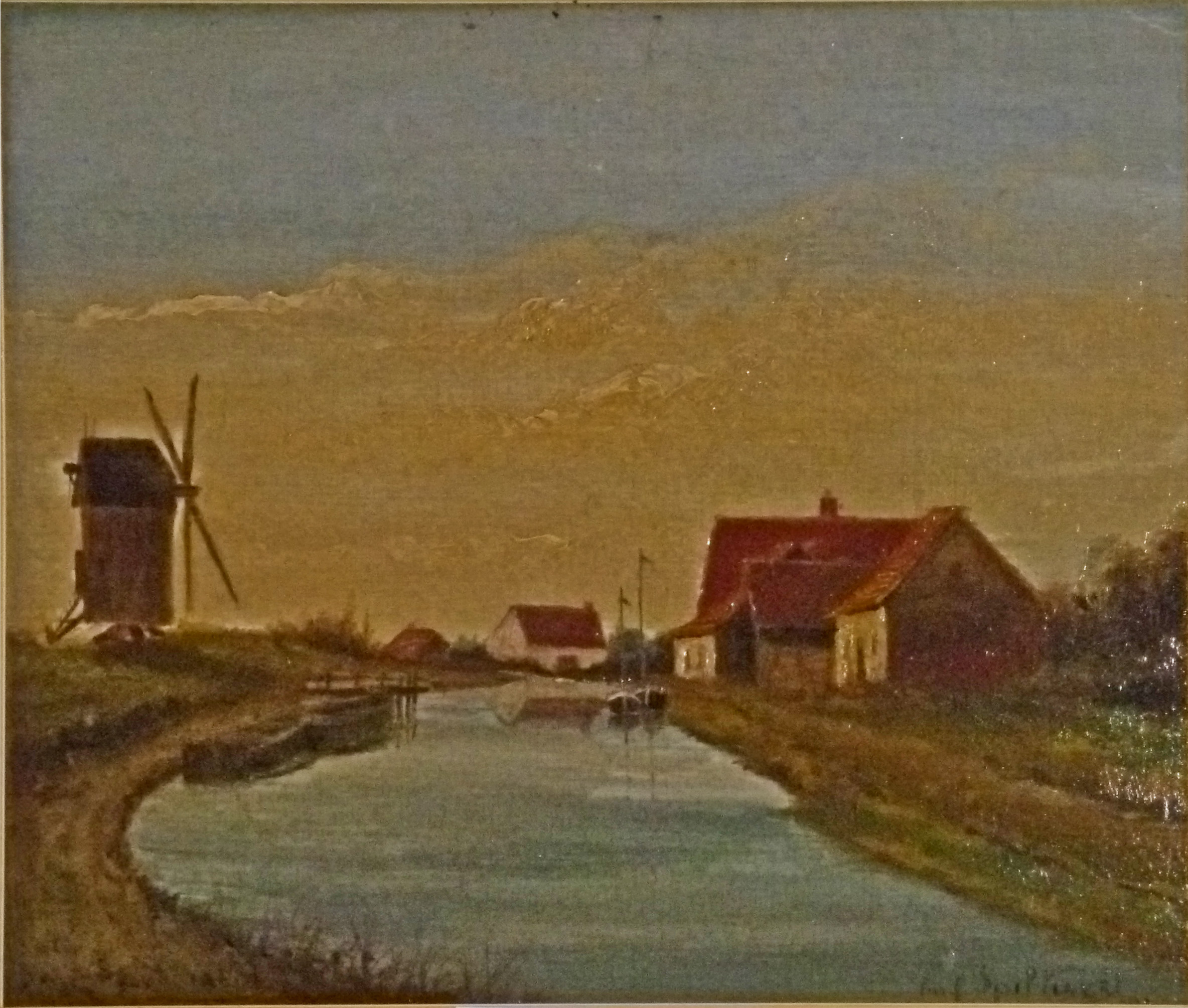 "Landschap met rivier, molen en hoevetje" (1881), olieverf op doek (20 x 28 cm) door de Belgische kunstschilder Emile Spilliaert (1858-1913); privébezit